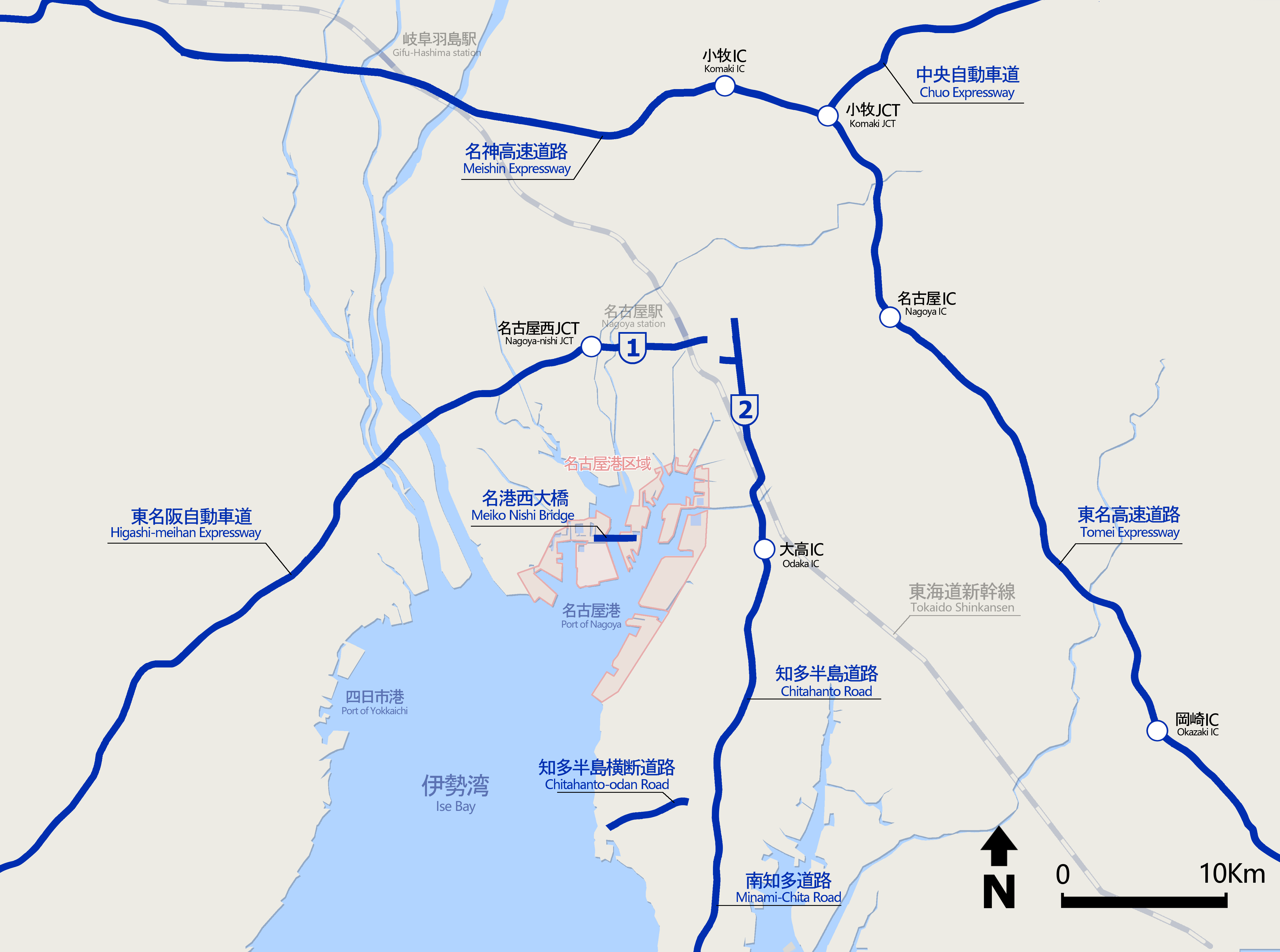 名古屋圏高速道路地図（1987年5月時点）